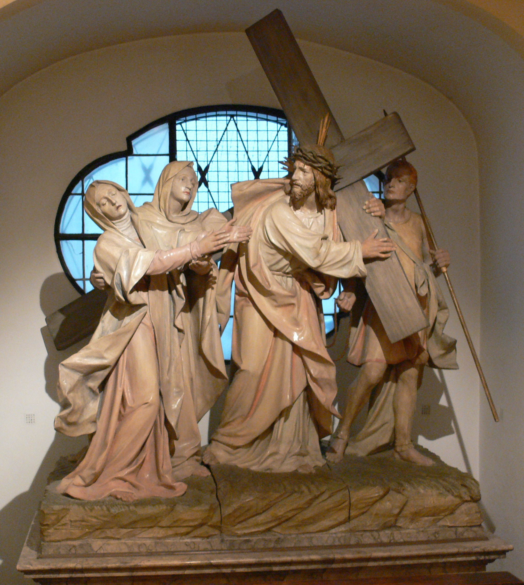 Bürgersaal, München: Kreuzweg in der Unterkirche, Kreuzwegstationen vom Ende des 19. Jh. Jesus tröstet die trauernden Frauen